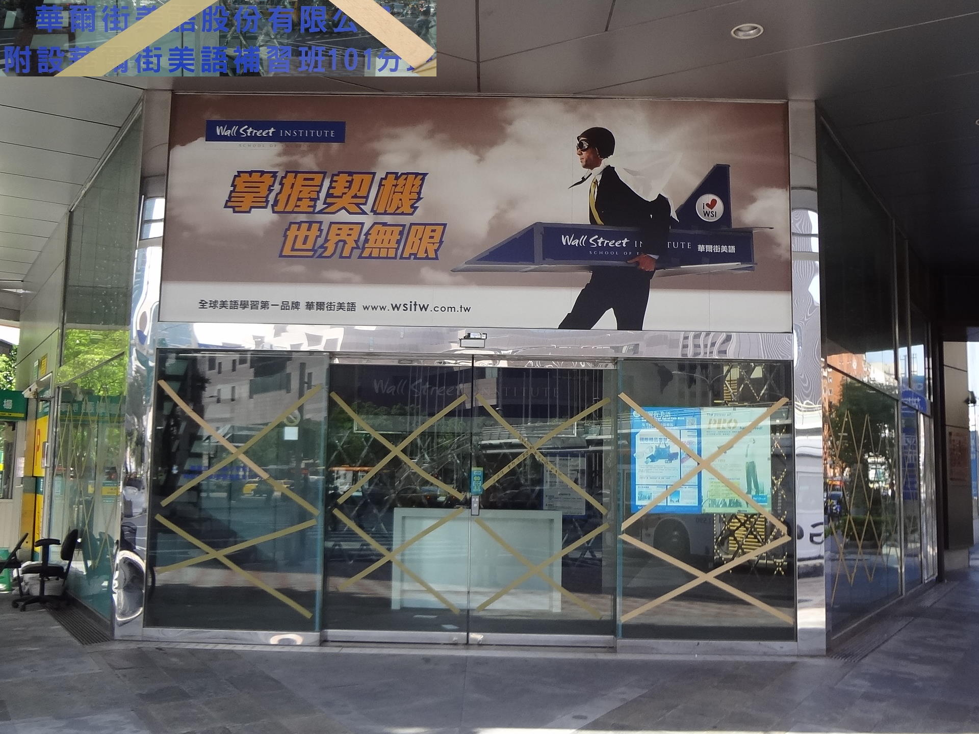 華爾街美語101分班，位於臺北市信義區信義路，2012年8月7日無預警歇業。